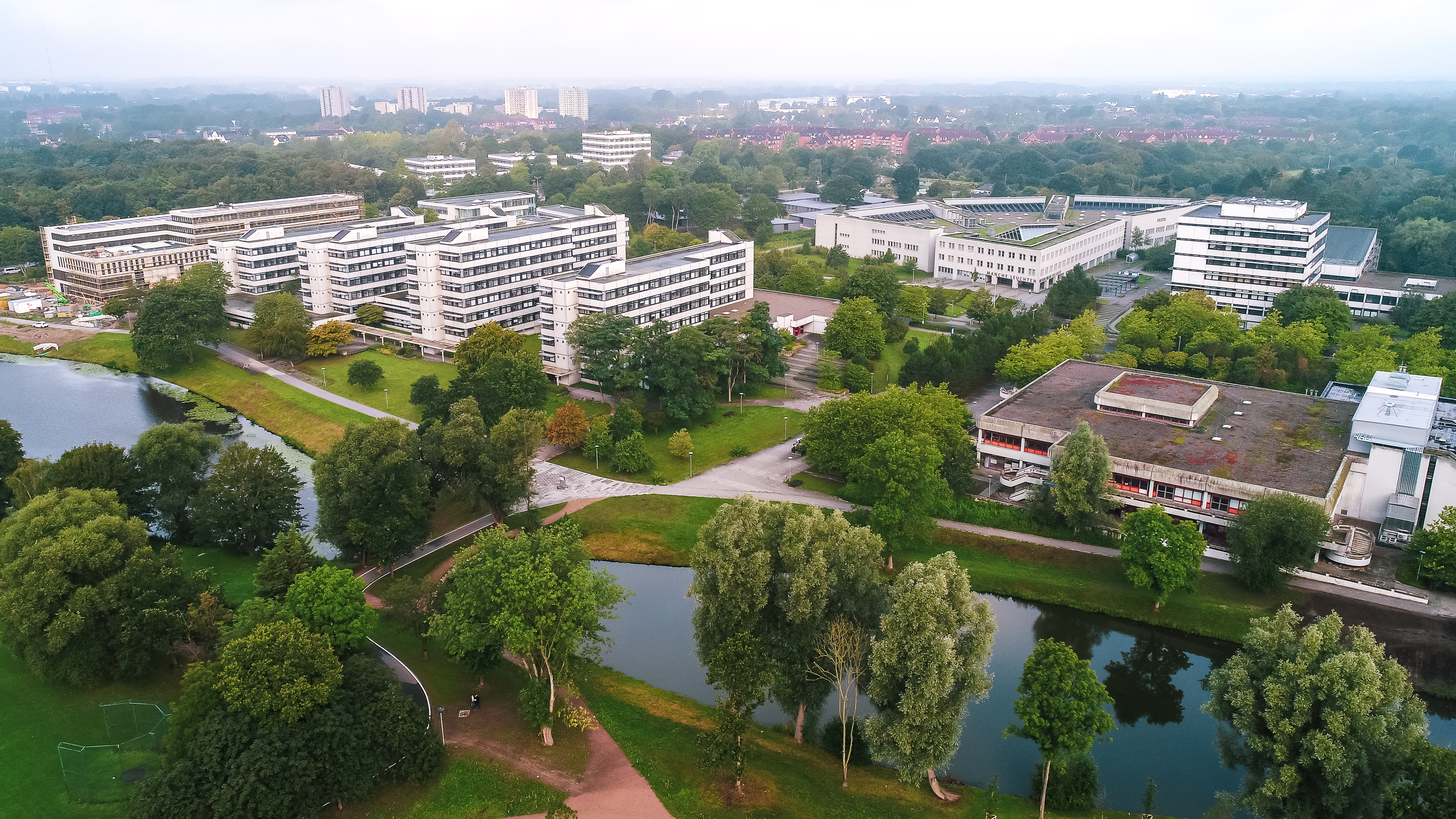 An der Leibniz-Straße ansässige Institute, die Mensa II (rechts über dem Teich) und die Universitätsbibliothek (oberhalb der Mensa links).